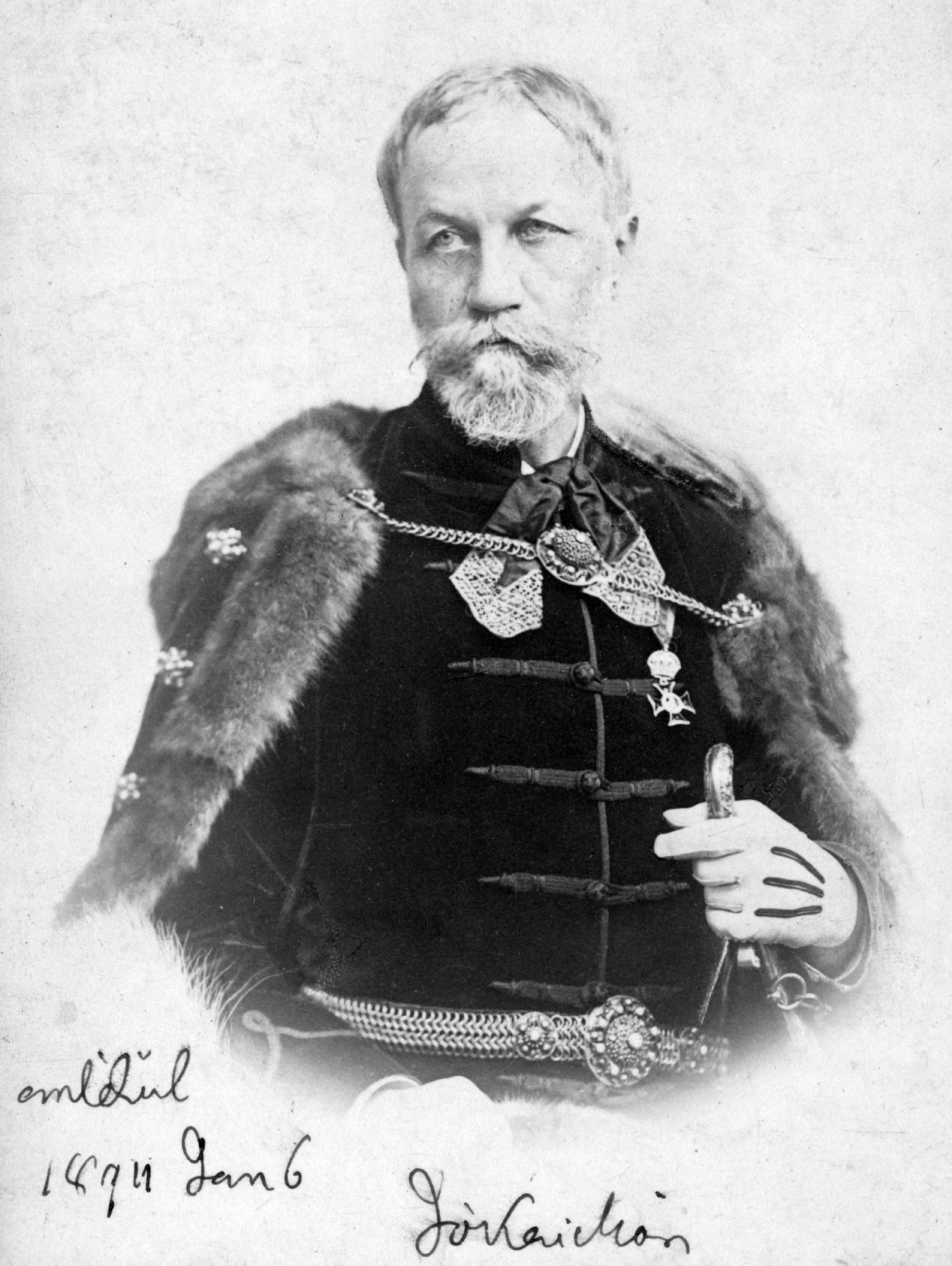 Jókai Mór író. Location: Hungary Tags: celebrity, portrait Title: Jókai Mór író.